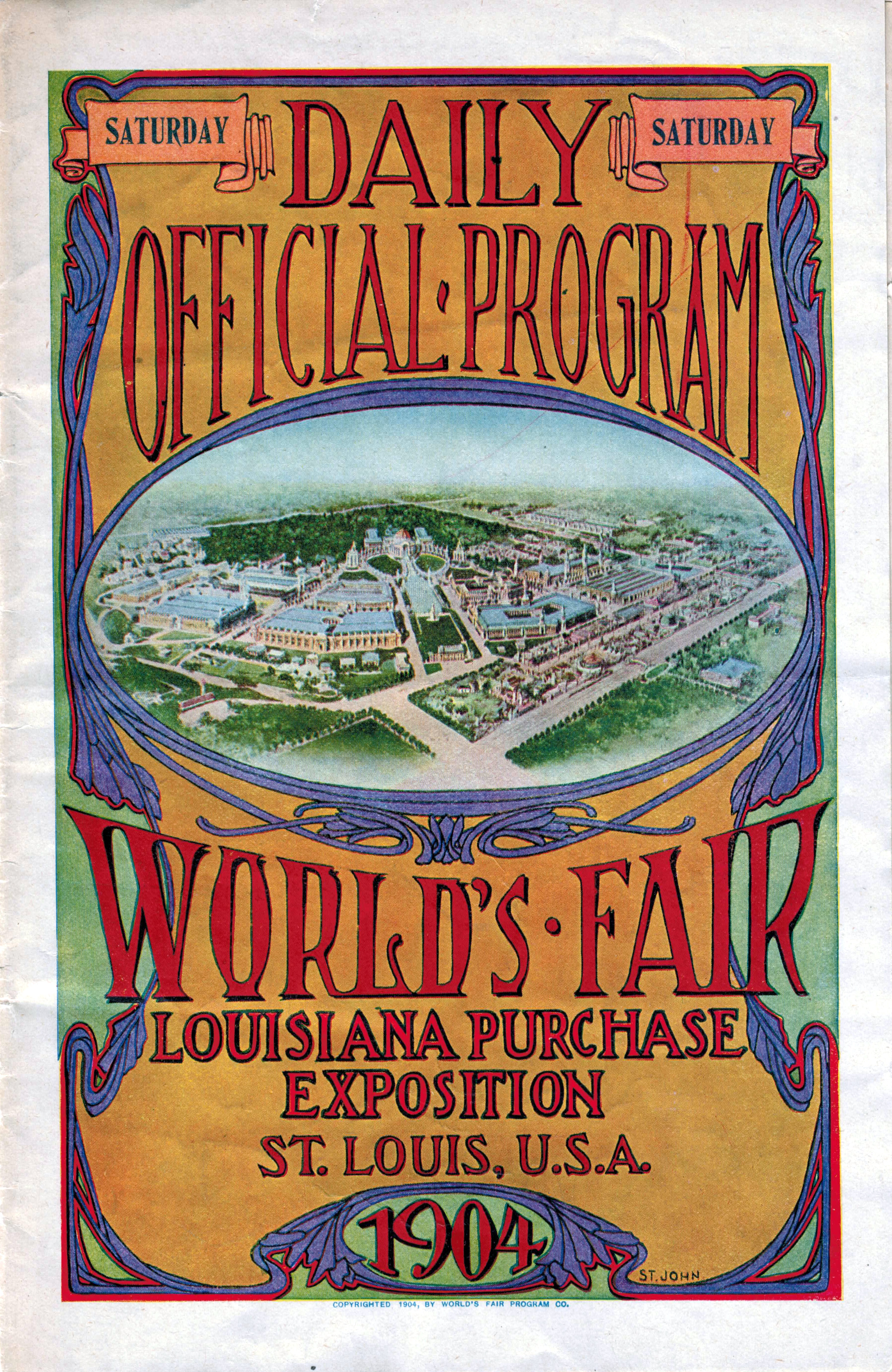 Couverture du programme journalier de l'Exposition universelle de 1904 (Saint-Louis (Missouri)) qui sert aussi d'affiche pour les Jeux olympiques de 1904.